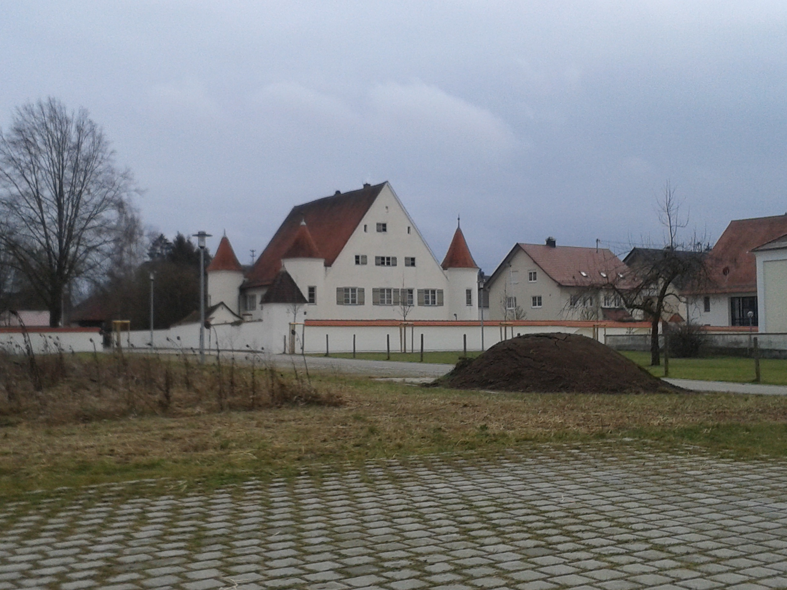 Berkheim (Pfarrhof) - Ehemalige Sommerresidenz der Äbte Reichsabtei Rot an der Rot